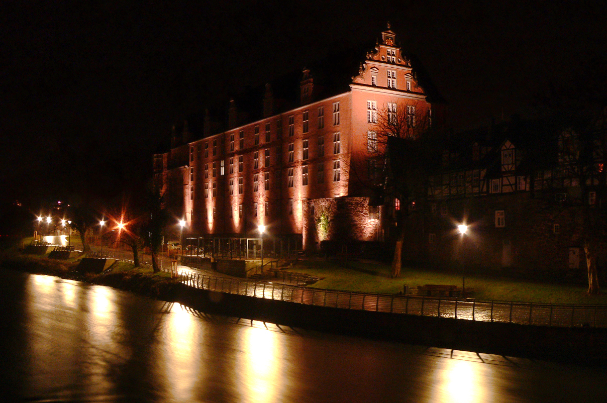 Welfenschloss (Hann. Münden)